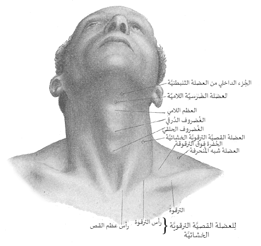 رسمٌ بيانيٌّ يُظهر عضلات الرقبة والحلق عند الإنسان.